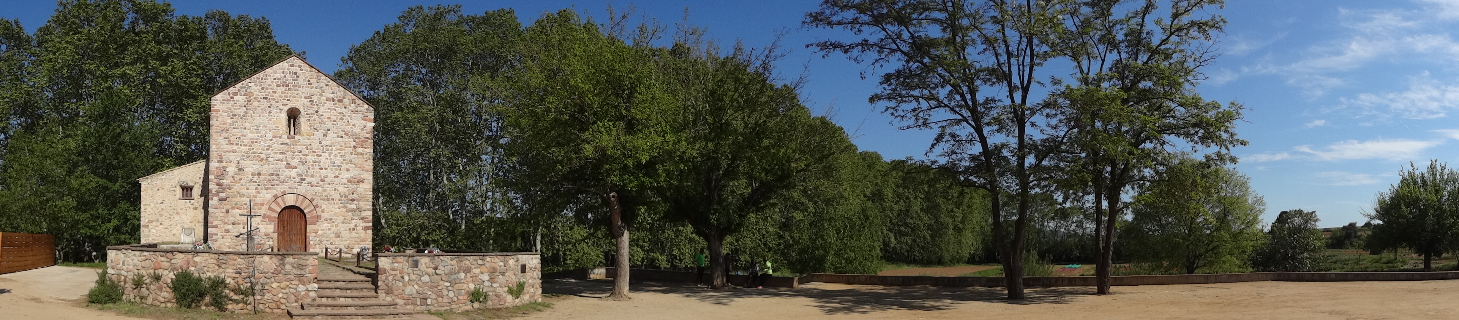 Gallecs. This is a a photo of a natural area in Catalonia, Spain, with id: ES510277